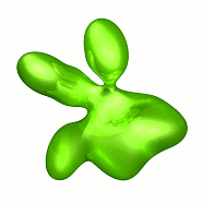 3D demonstratie van metaball. Eigen ontwerp, met programma Strata 3D 3.0.2 (gratis versie die ook gebruikt mag worden, geen demo-versie)